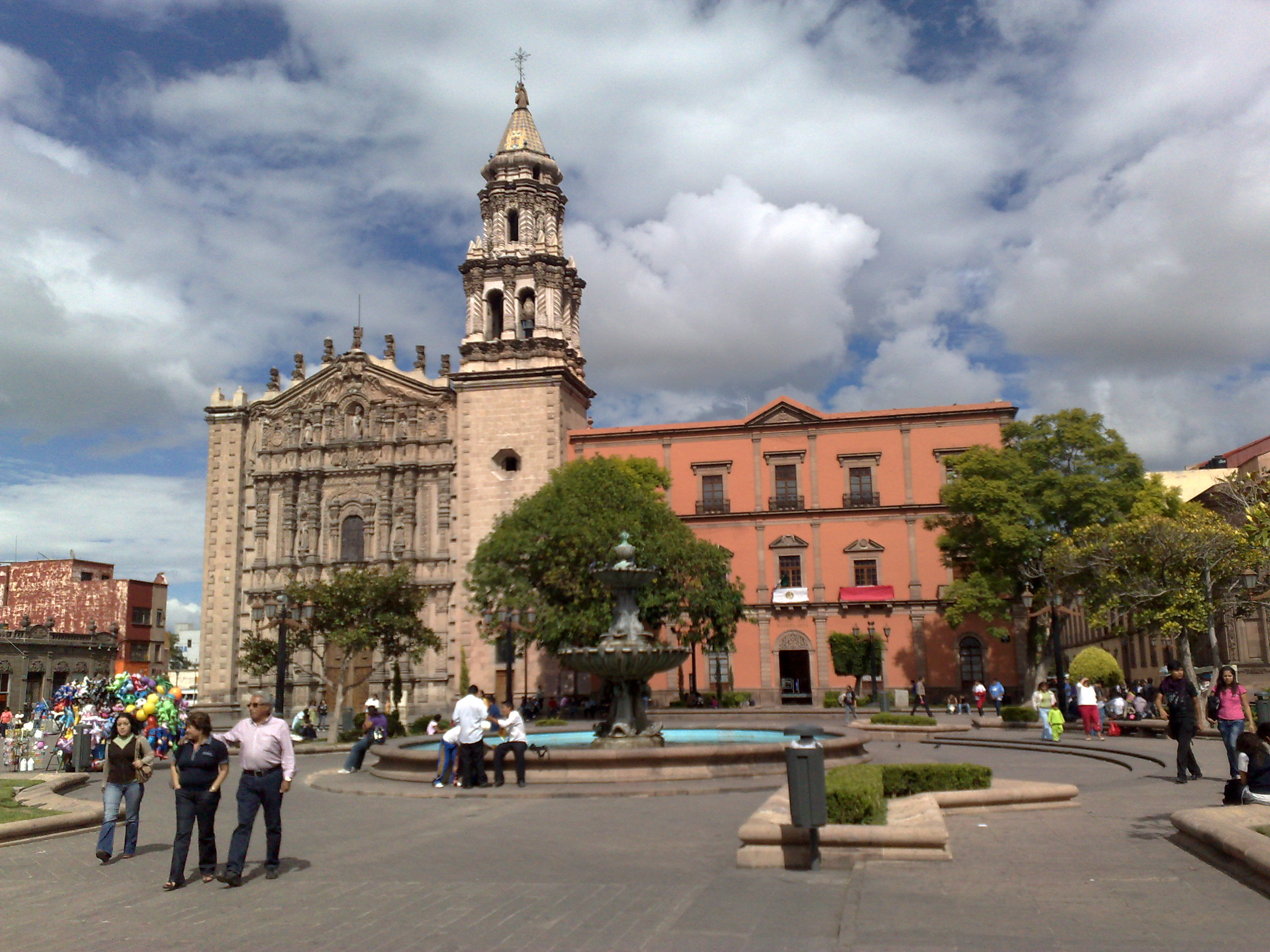 Una tarde típica en la Plaza del Carmen de San Luís Potosí, con el Ex-convento del Carmen al fondo, donde se reúnen las familias.